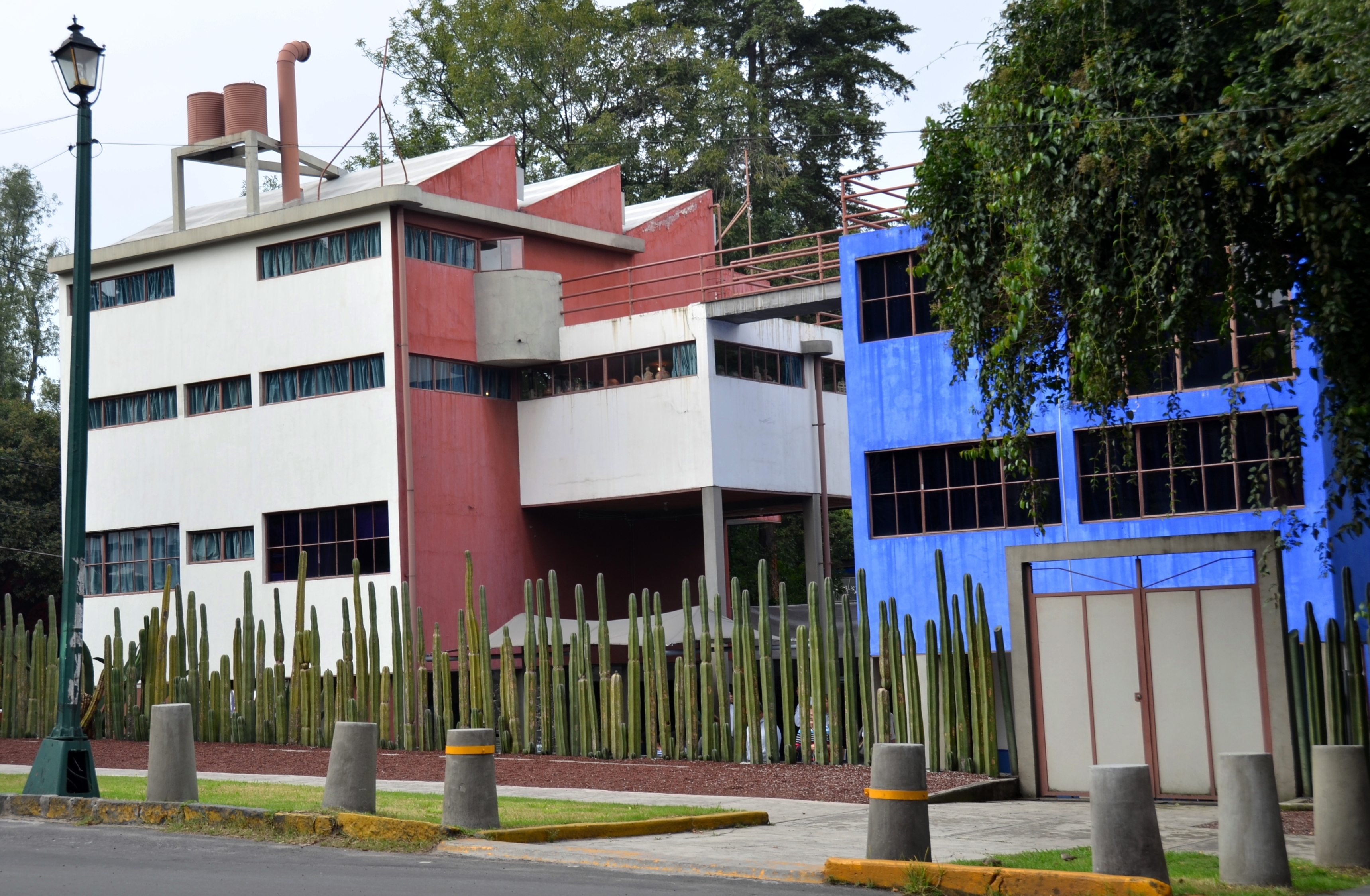 Casa Habitación Rivera y Kalho en San Angel Inn